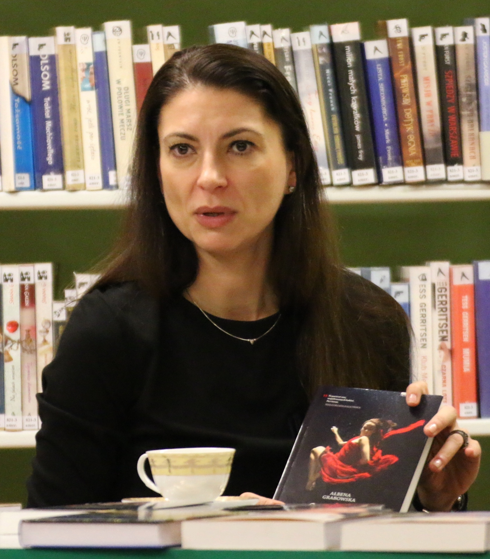 Ałbena Grabowska (polska pisarka i lekarka) podczas spotkania "Książka z autografem" w Bibliotece Publicznej w Ożarowie Mazowieckim.